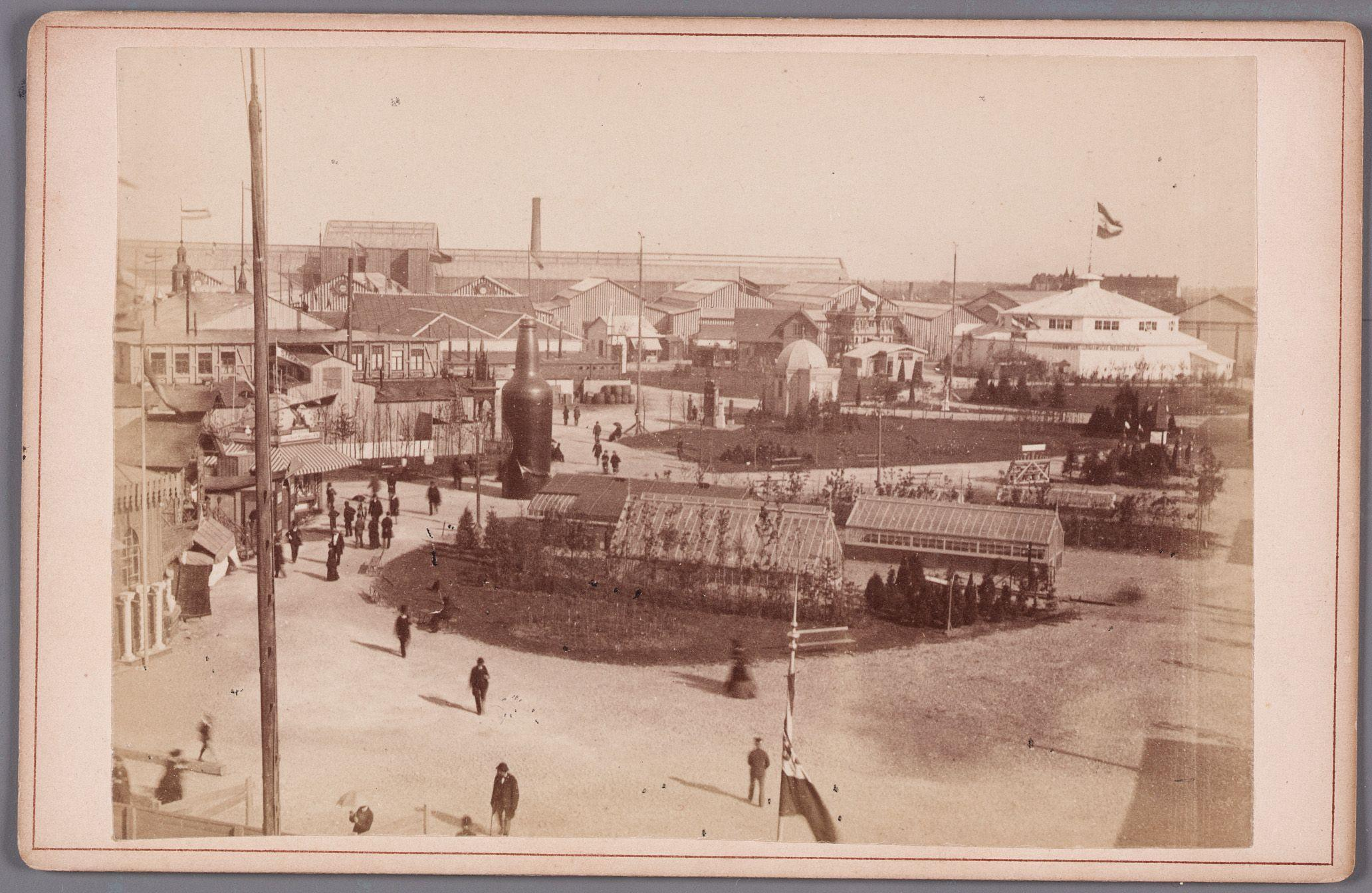 Beschrijving Wereldtentoonstelling op de Museumterreinen (Museumplein) De Internationale, Koloniale en Uitvoerhandel Tentoonstelling Amsterdam 1883. De zuidwestelijke hoek van het terrein gezien vanaf de hoek Van Baerlestraat en Pieter Cornelisz. Hooftstraat. Rechts op de achtergrond de rotonde voor de 'Surinaamsche Inboorlingen'. Documenttype foto Vervaardiger Reynet de la Rue, P.H.J. Collectie Collectie Stadsarchief Amsterdam: kabinetfoto's Datering 1883 Geografische naam Museumplein Inventarissen Afbeeldingsbestand 010005000932 Generated with Dememorixer